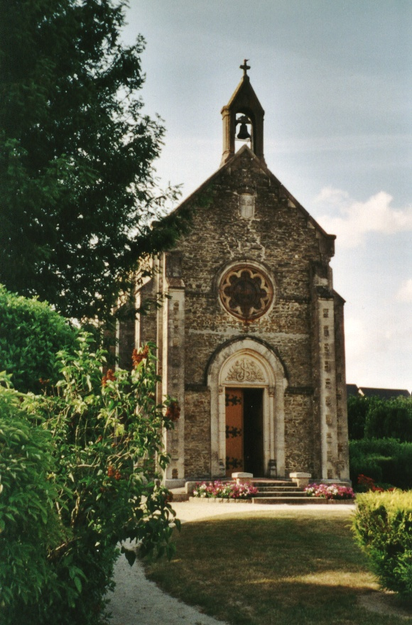 Chapelle Saint-Joseph à Méral,tombeau de Victoire Brielle